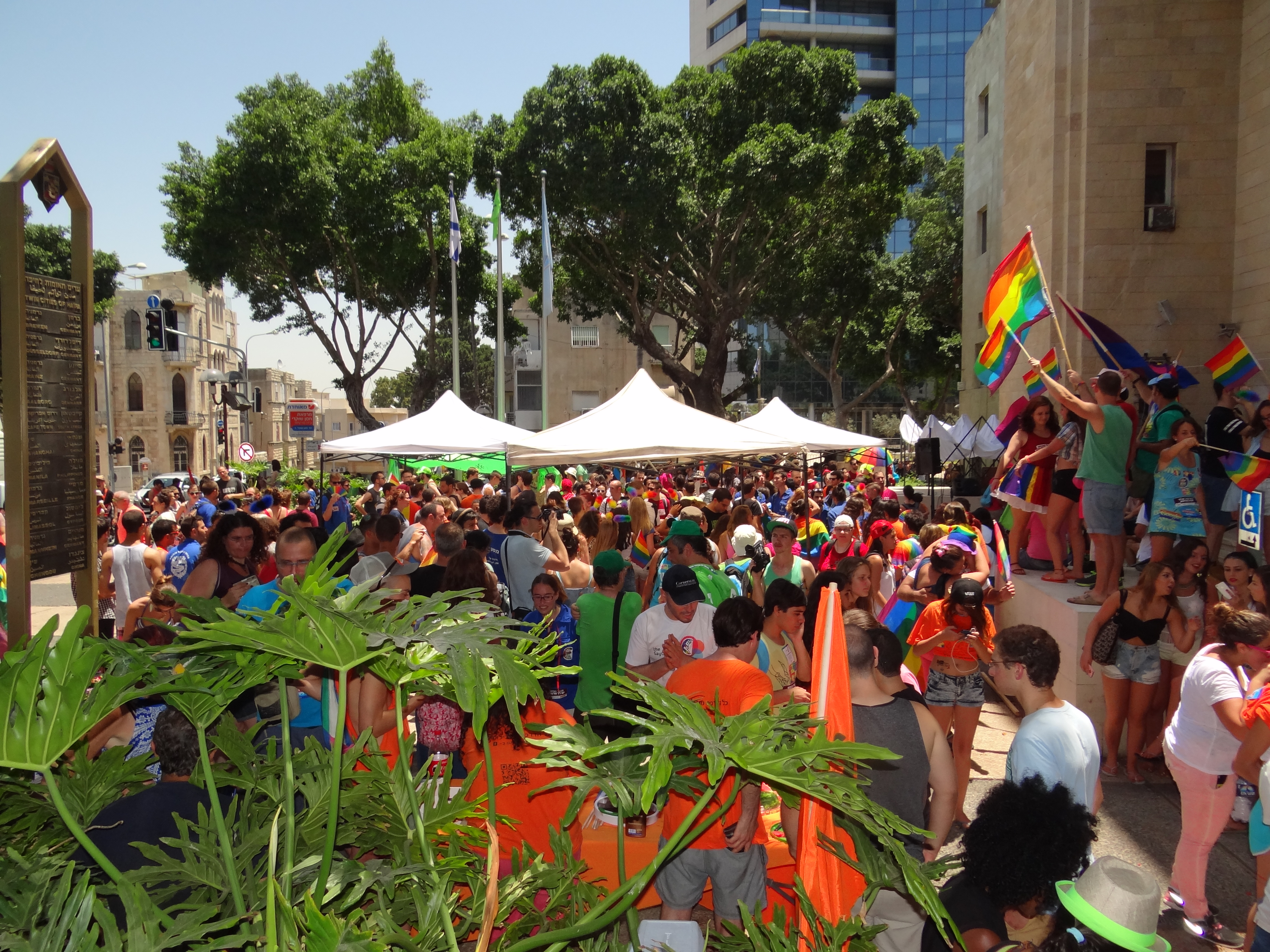 מצעד הגאווה בחיפה שהתקיים ב-27 ביוני 2014. תחילתו הייתה ברחבה ברחוב הנביאים 26 פינת אחד העם. במקום הזה התחילה ההתכנסות. בשעה 12:00 יצא המצעד לדרך בעוברו ברחוב הנביאים לכיוון צפון, פנה ברחוב הרצל עד בית הקרנות שם פנה לרחוב ביאליק, חצה את רחוב החלוץ ועד רחוב חסן שוקרי ורחבת העירייה. שם התקיים מופע ונישאו נאומים. תחילת יציאת המצעד לדרך ברחוב הנביאים תמונה מהעצרת ברחבת מבנה העירייה